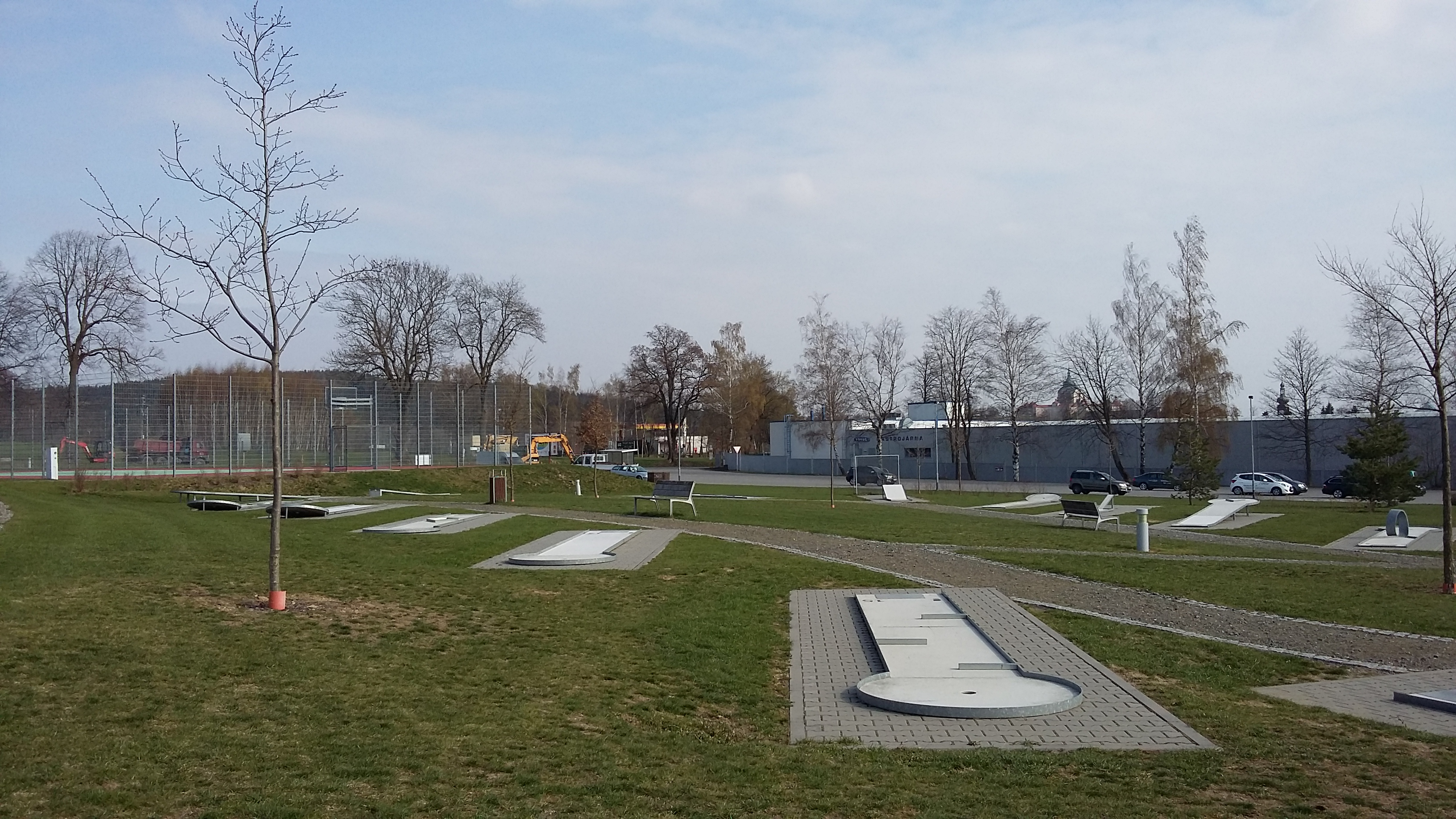 Minigolf